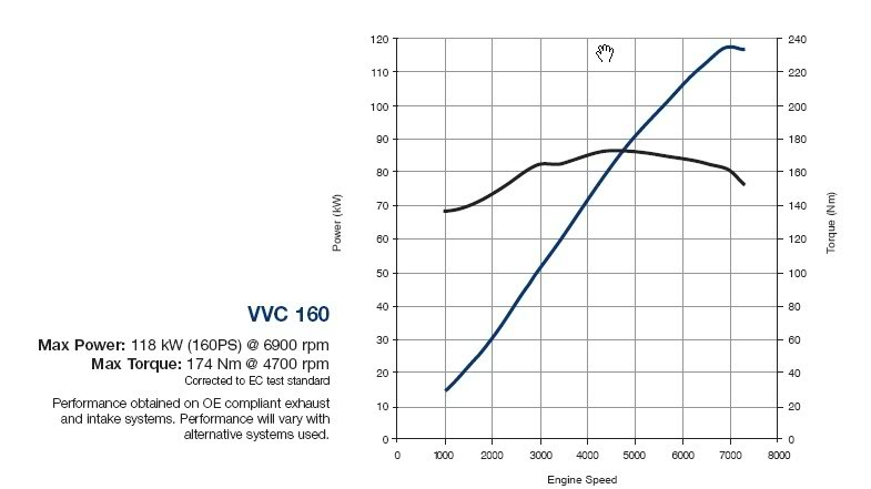 Výkonová křivka systému VVC motoru K series 1.8 l, 16V